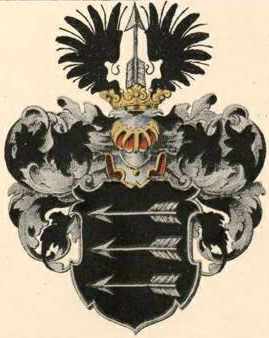 Boltho von Hohenbachi suguvõsa aadlivapp